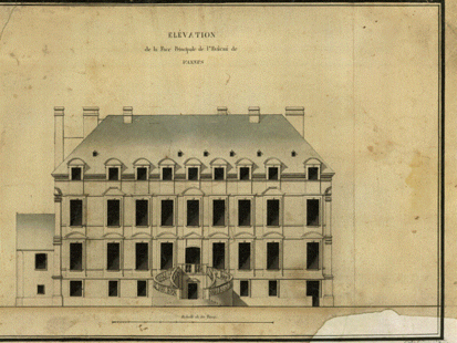 Plan de la façade du Château de la Motte de Vannes